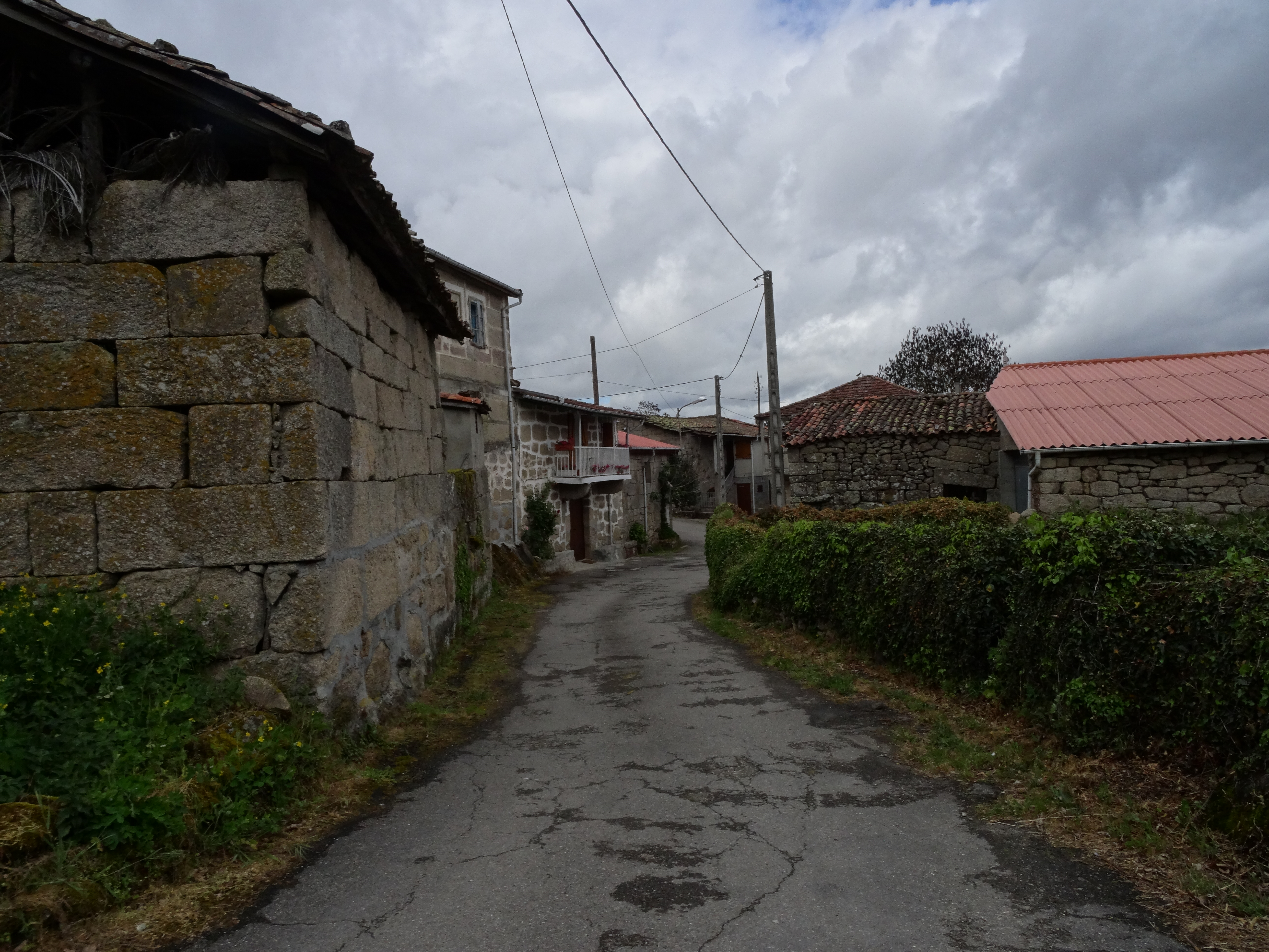 Ver título.